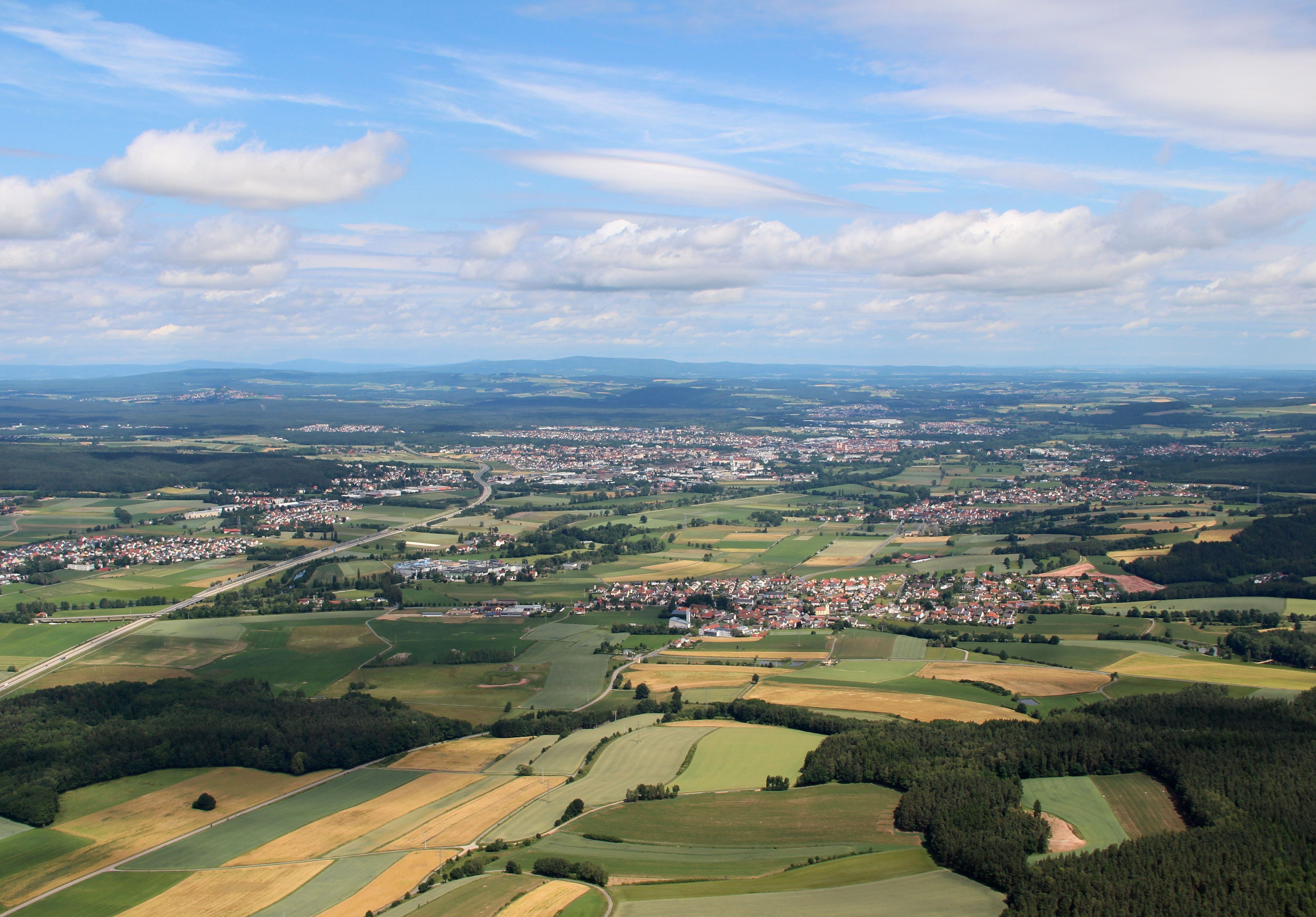 Pirk, links Rothenstadt, Schirmitz, Weiden (2012)